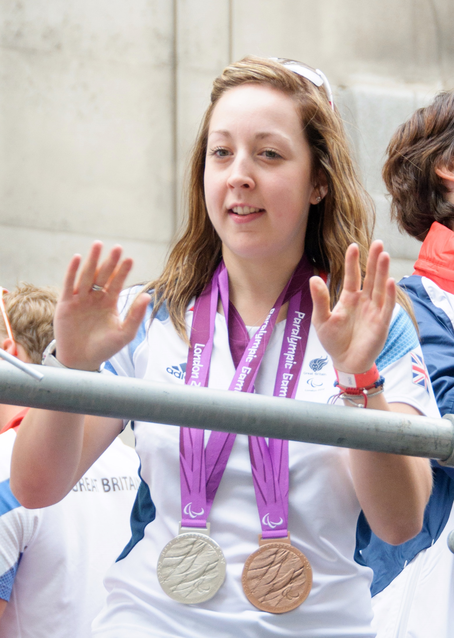 Helen Scott - Aileen McGlynn's pilot